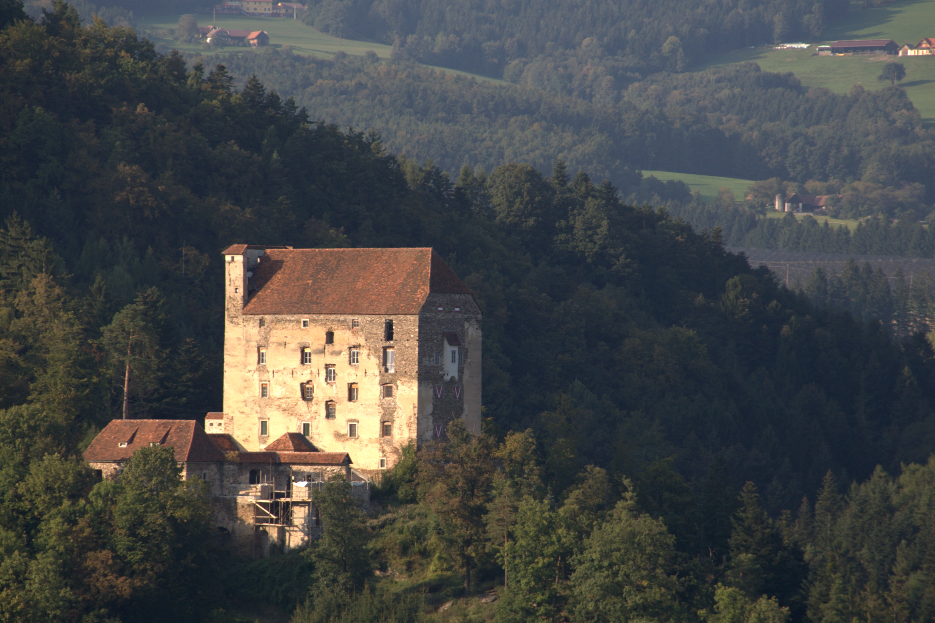 Burgruine Neuhaus